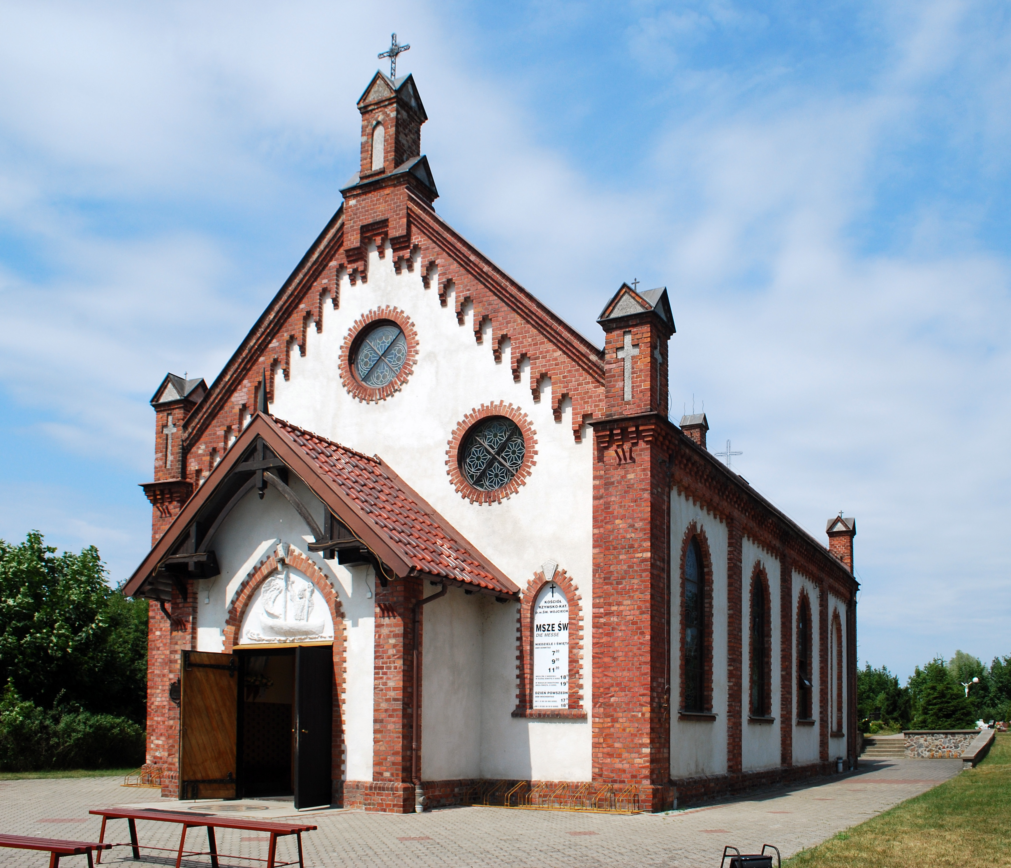 Kościół w Sztutowie.